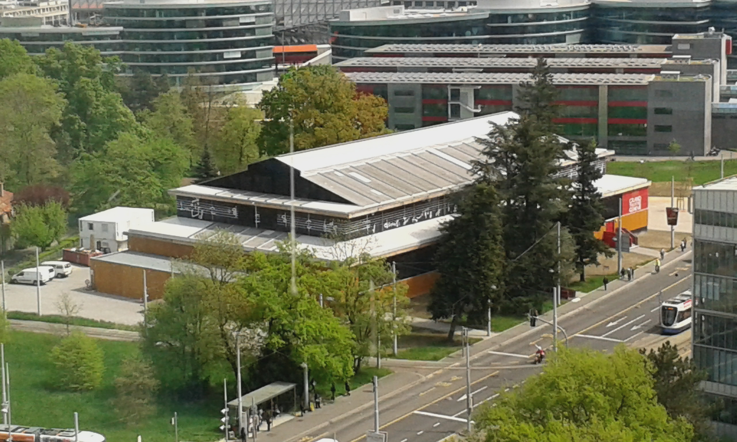 Durant les travaux du Grand Théâtre de Genève de février 2016 à juillet 2018, une structure en bois de remplacement est mise en place Place des Nations à Genève , appelé Opéra des Nations